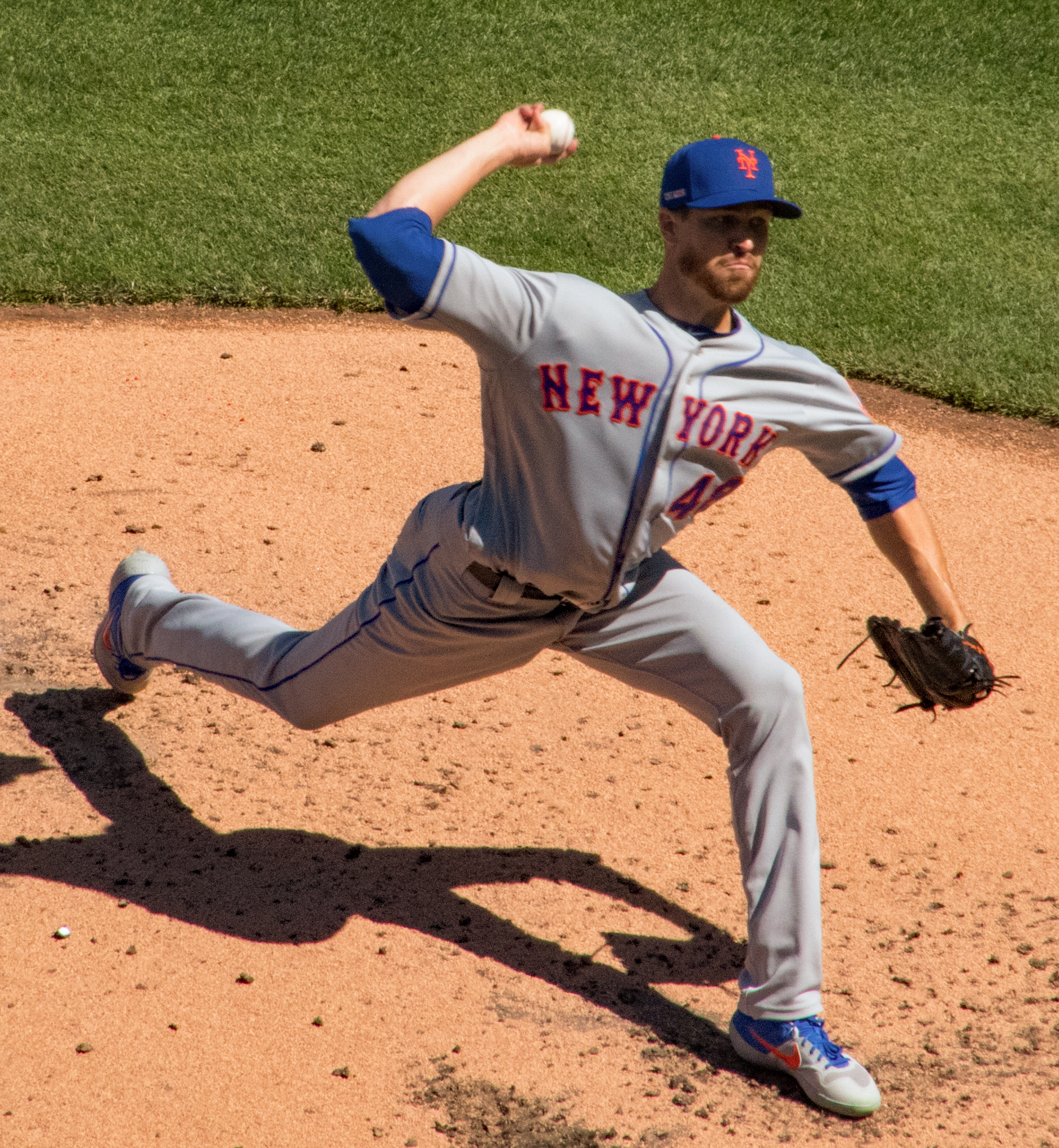 Jacob deGrom